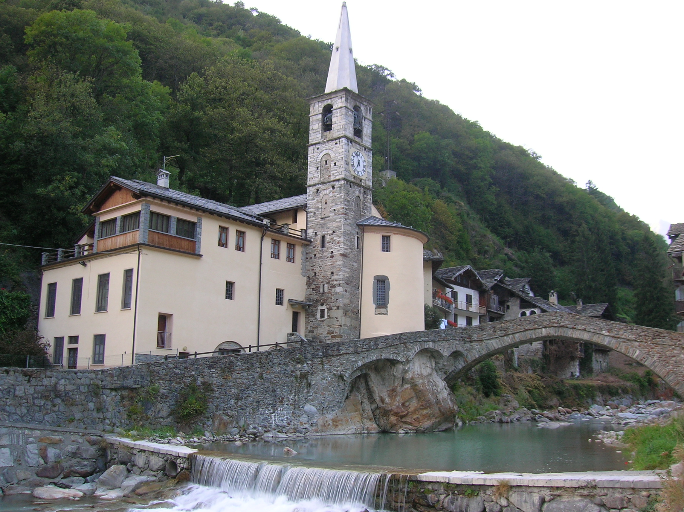 Fontainemore, Valle d'Aosta, Italia.